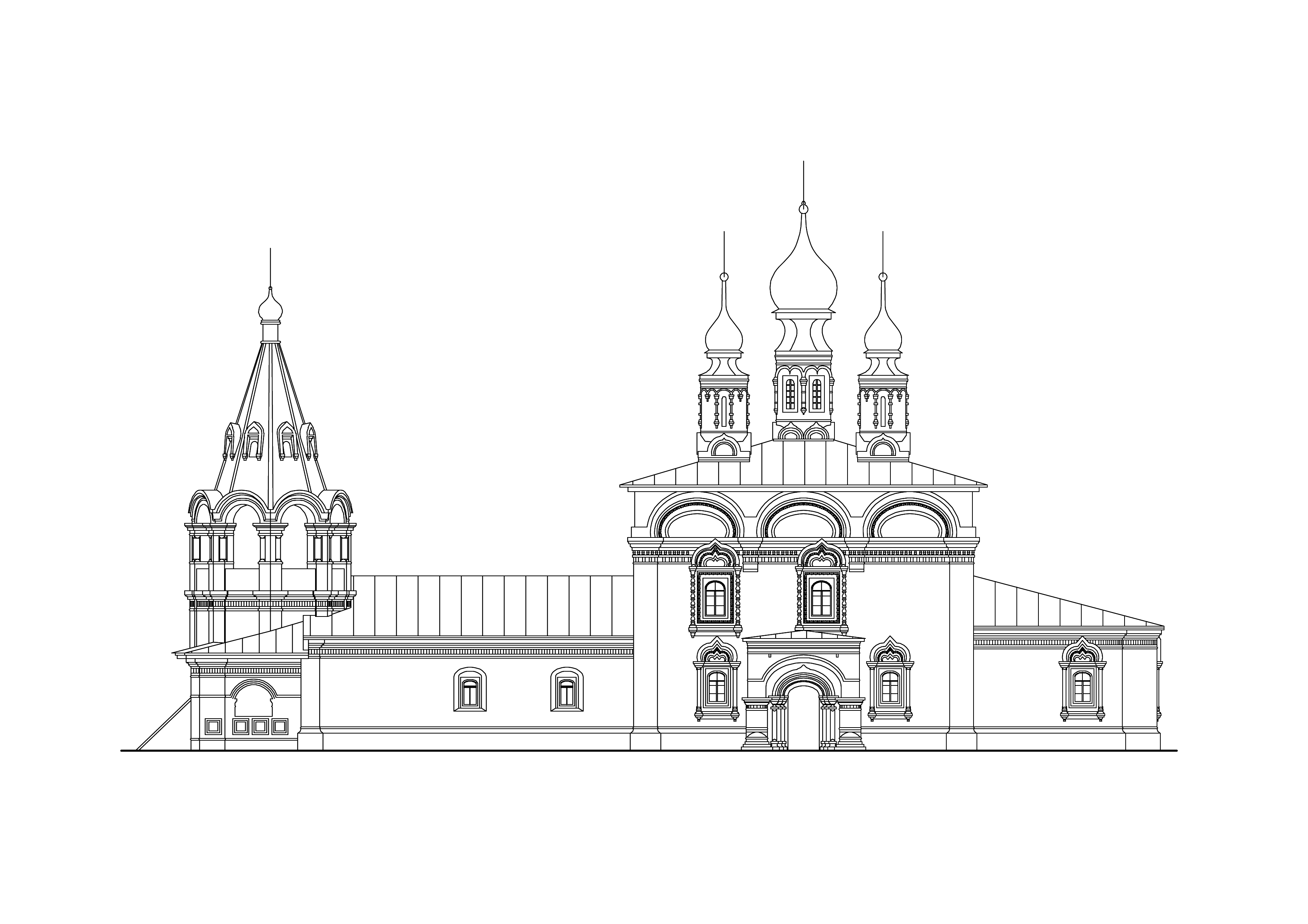 Церковь Преображения. Чертёж.Город Соликамск